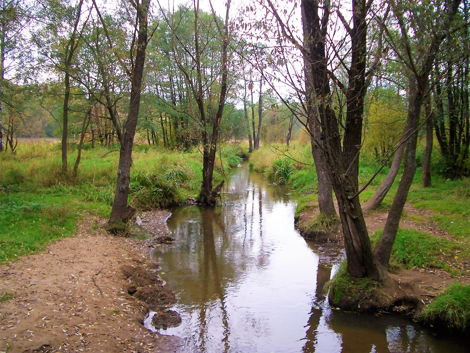 Река Серебрянка в Измайловском парке.